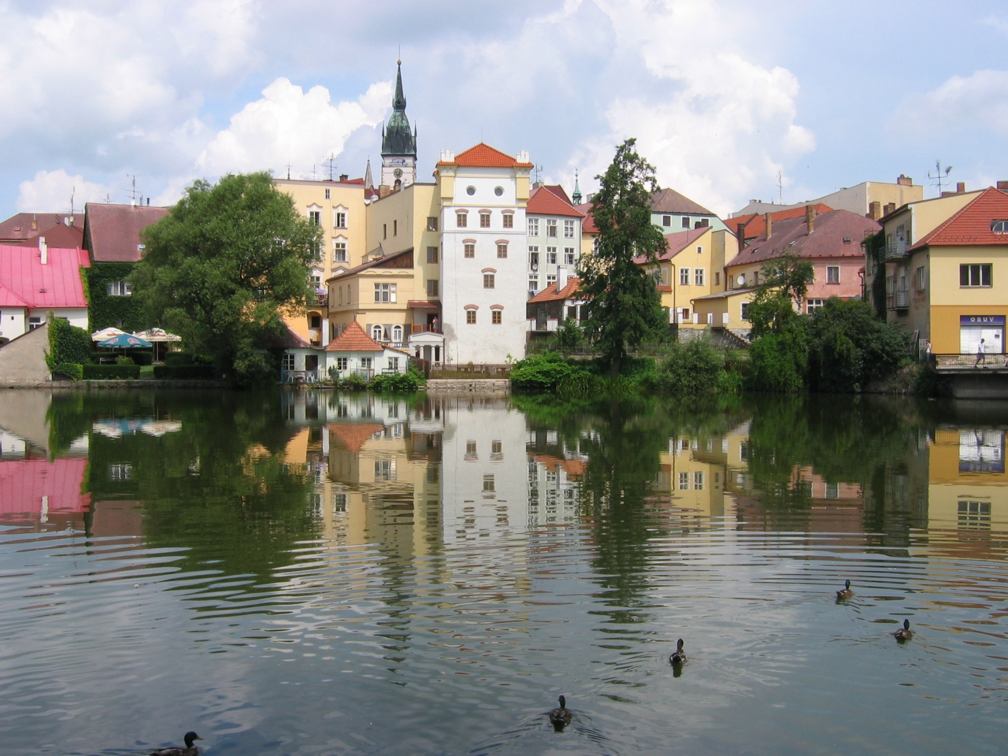 en: Jindřichův Hradec in the South Bohemian Region de: Jindřichův Hradec in Südböhmen